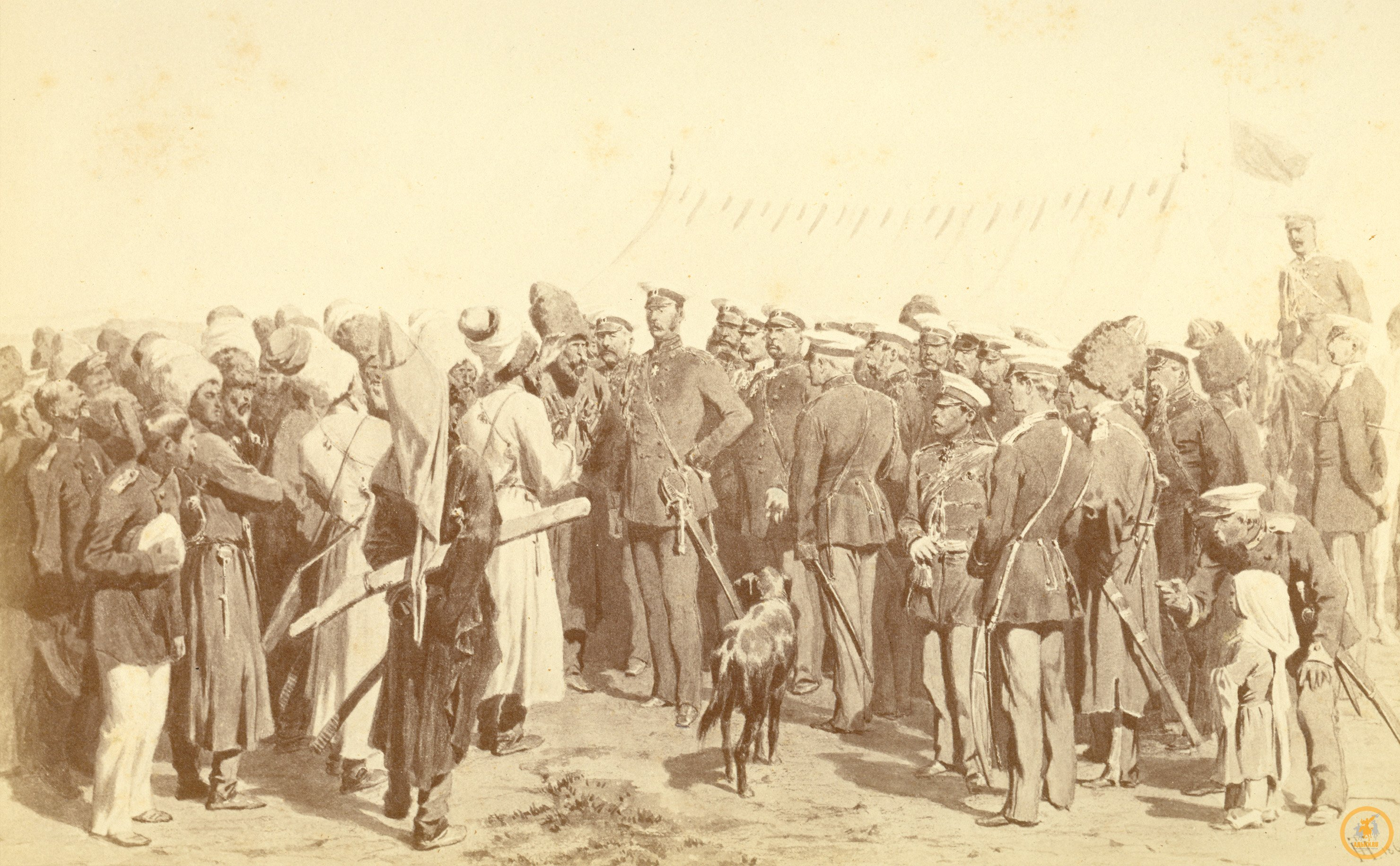 Адыгские племенные вожди переходят под власть Российской Империи. Хотя после этого договора были активные фазы сражений с племенами, этот момент считается началом вхождения Черкесии в состав РИ. На этом месте была воздвигнута прекрасная часовня (в наст. время разрушена и не восстанавливается) близ станицы Новосвободной Респ. Адыгеи.